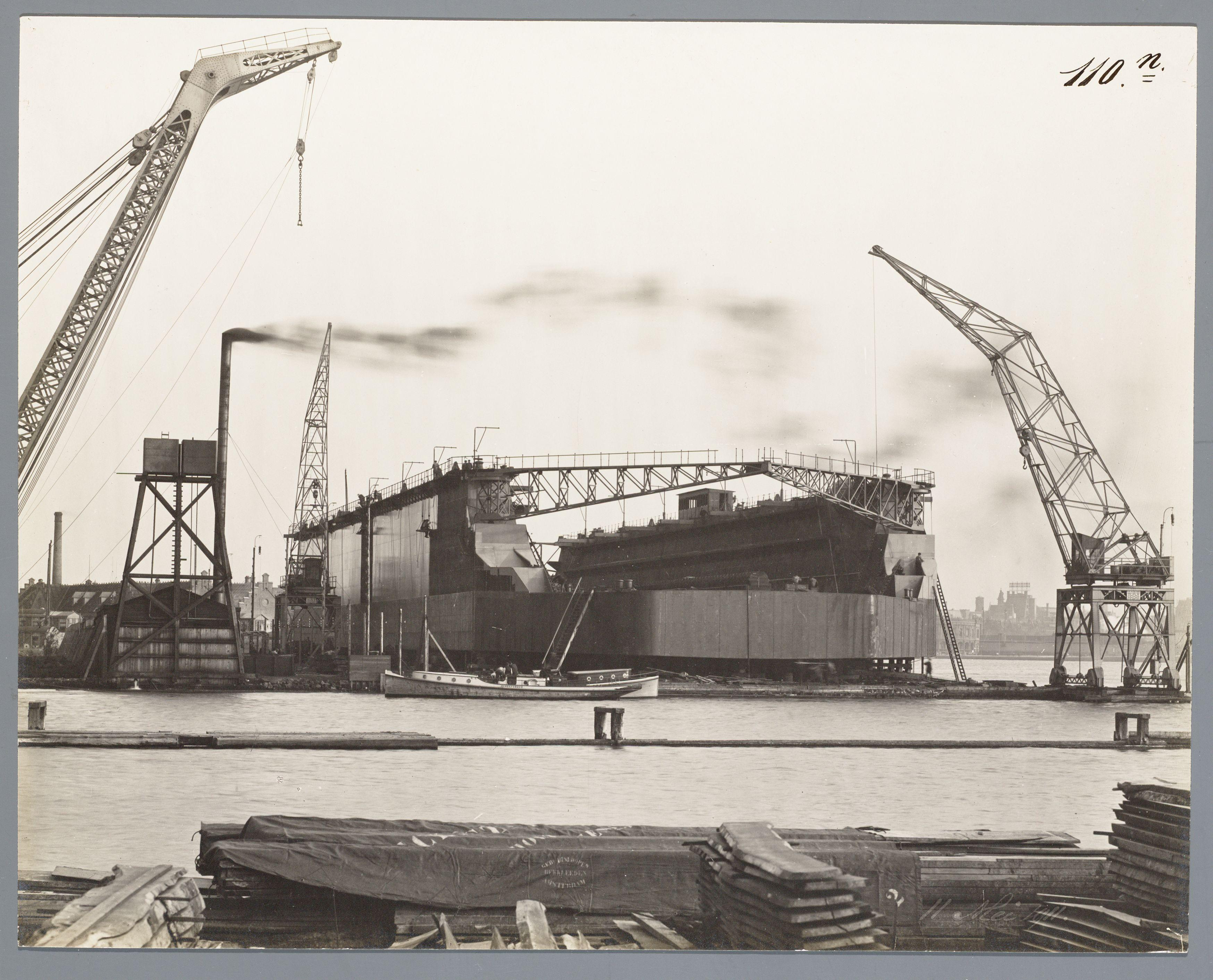 Beschrijving Het Julianadok, bouwnummer 110, gebouwd door de Nederlandsche Scheepsbouw Maatschappij (N.S.M.) aan de Conradweg in opdracht van de Amsterdamsche Droogdok Maatschappij (A.D.M.) Meeuwenlaan 42. Documenttype foto Vervaardiger Oosterhuis, Gustaaf (1858-1938) Collectie Archief Nederlandse Dok- en Scheepsbouw Mij.: foto's Datering 12 mei 1911 Geografische naam IJ Inventarissen Afbeeldingsbestand 010179000081 Generated with Dememorixer